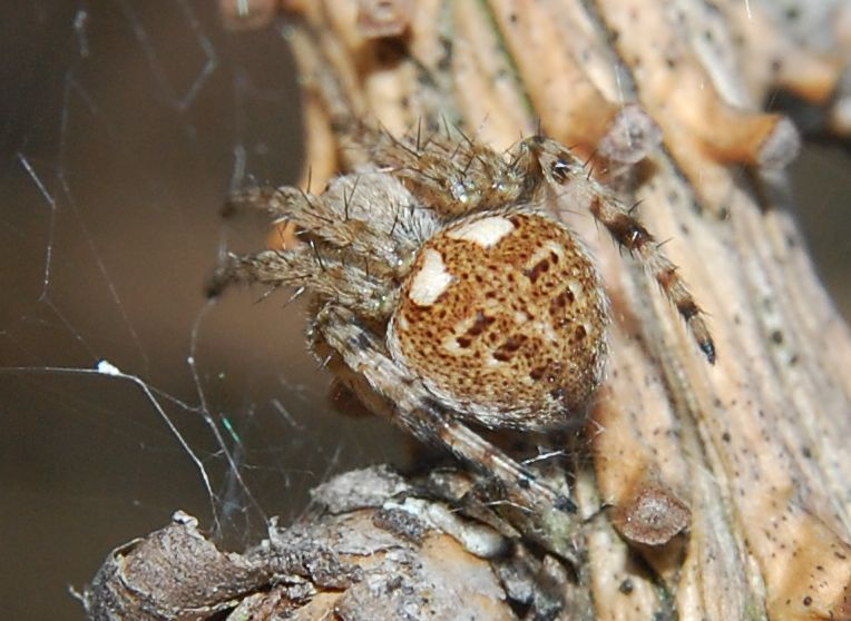 Agalenatea redii, female